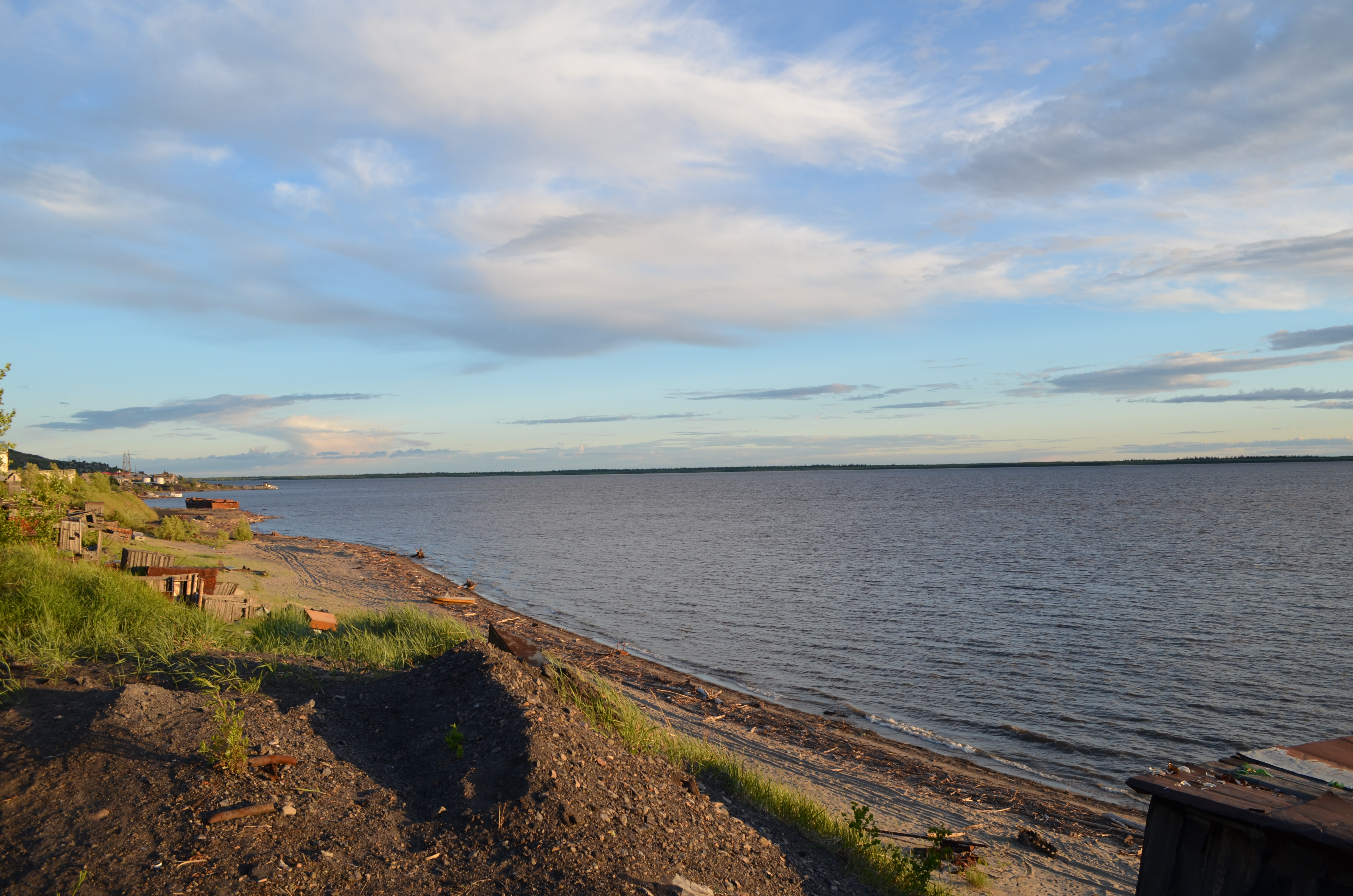 Поездка в Сангар 19-20.06.2016 на теплоходе Ракета-269